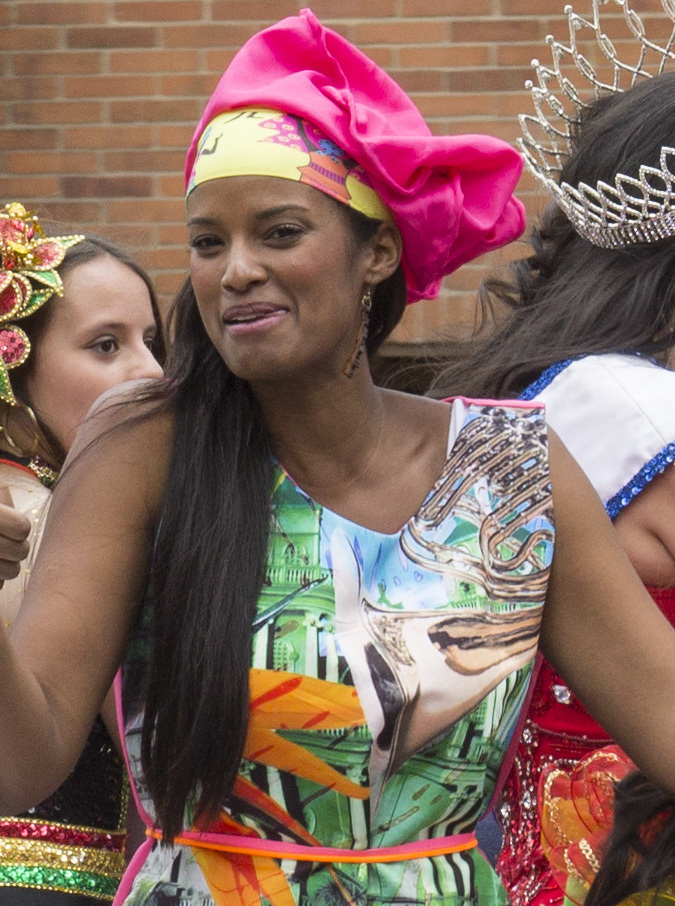 XXXVI versión de la Caminata de la Solidaridad por Colombia